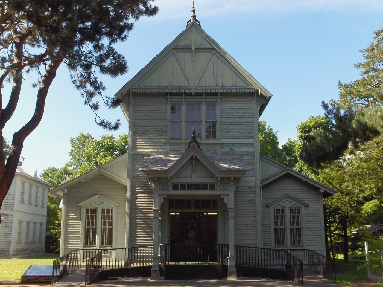 北海道札幌市、北海道大学植物園・博物館。2007年7月、投稿者K. Takeda撮影。